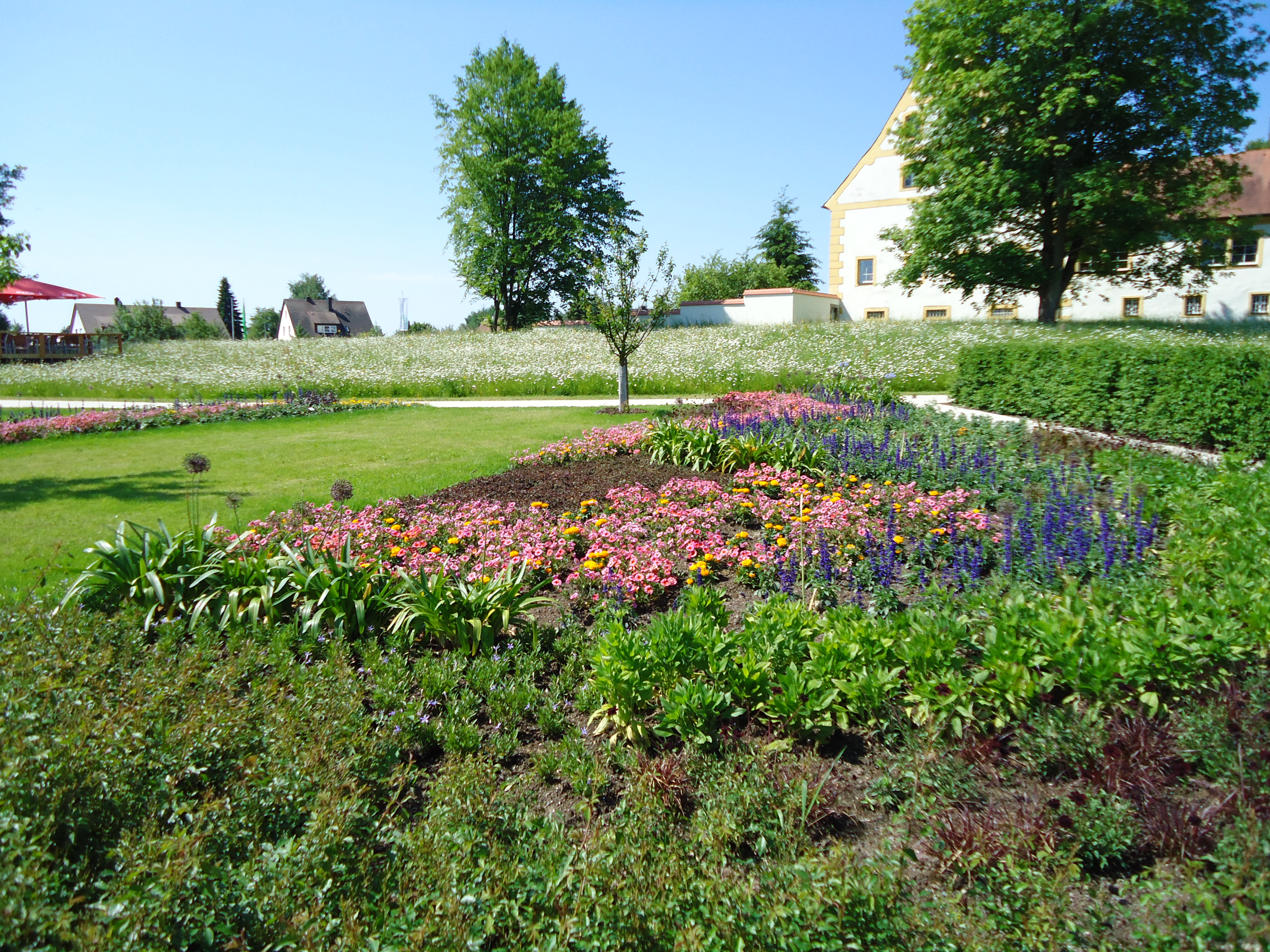 Landesgartenschau Tirschenreuth 2013 - Sommerflor